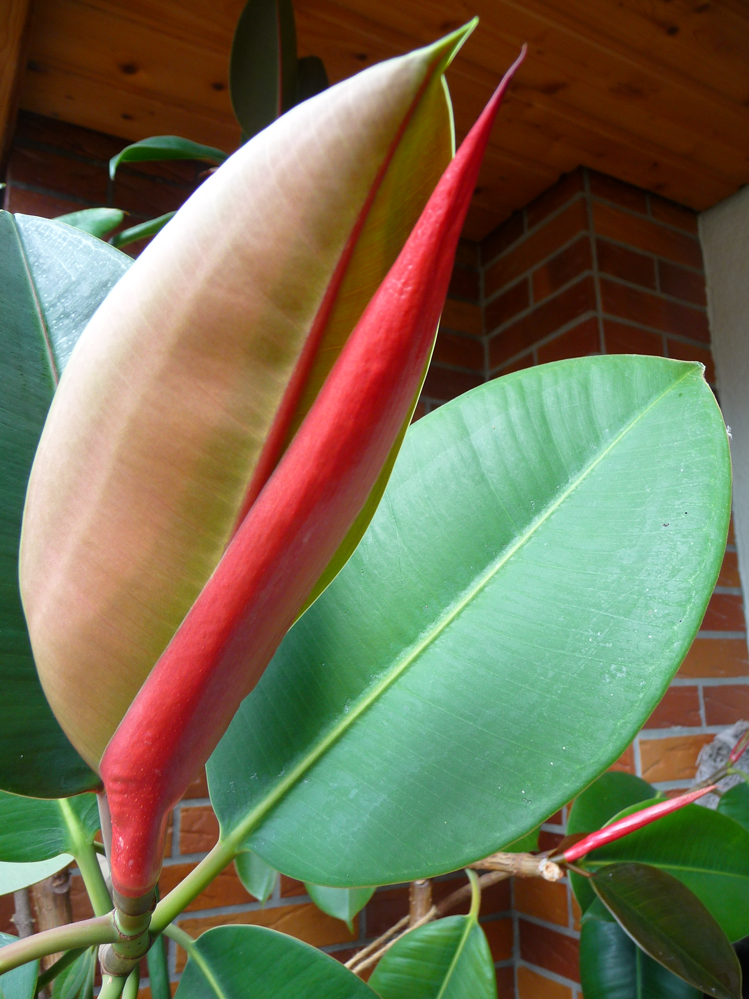 Neues Blatt eines Gummibaums (Ficus elastica), einer in Deutschland wieder beliebten Zimmerpflanze